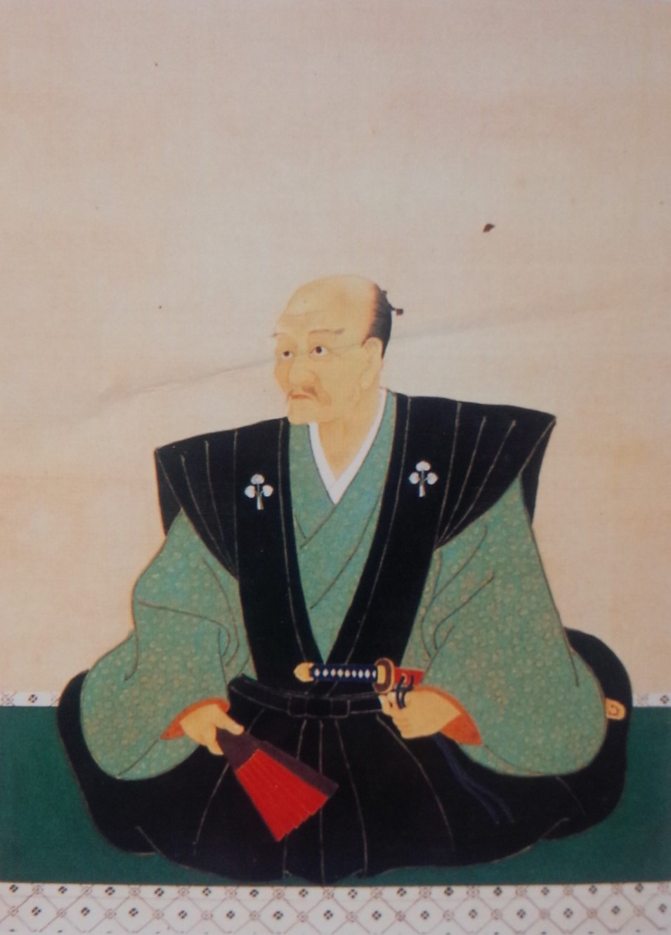 本多正重の肖像。